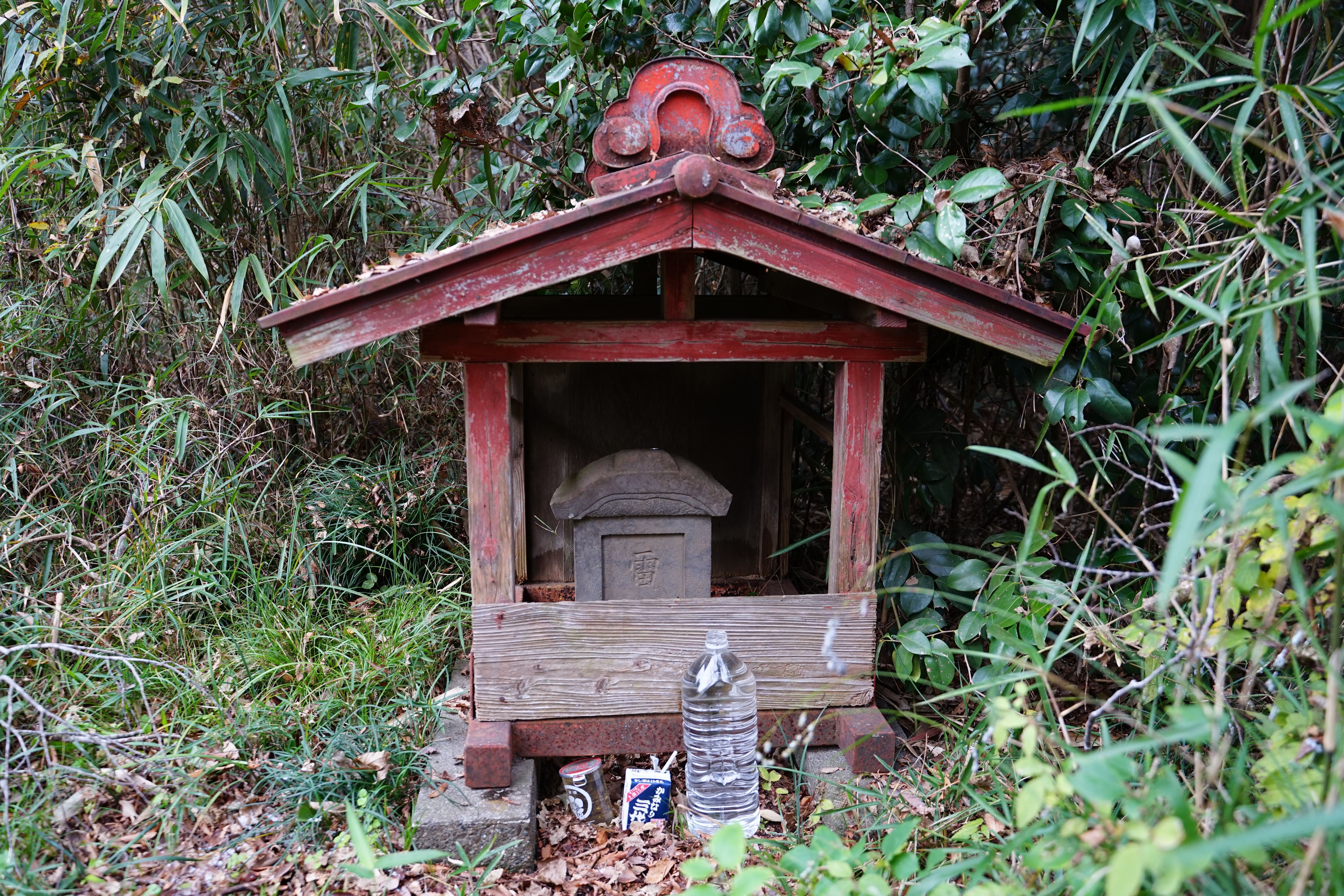 金村別雷神社の雷電社（茨城県つくば市）